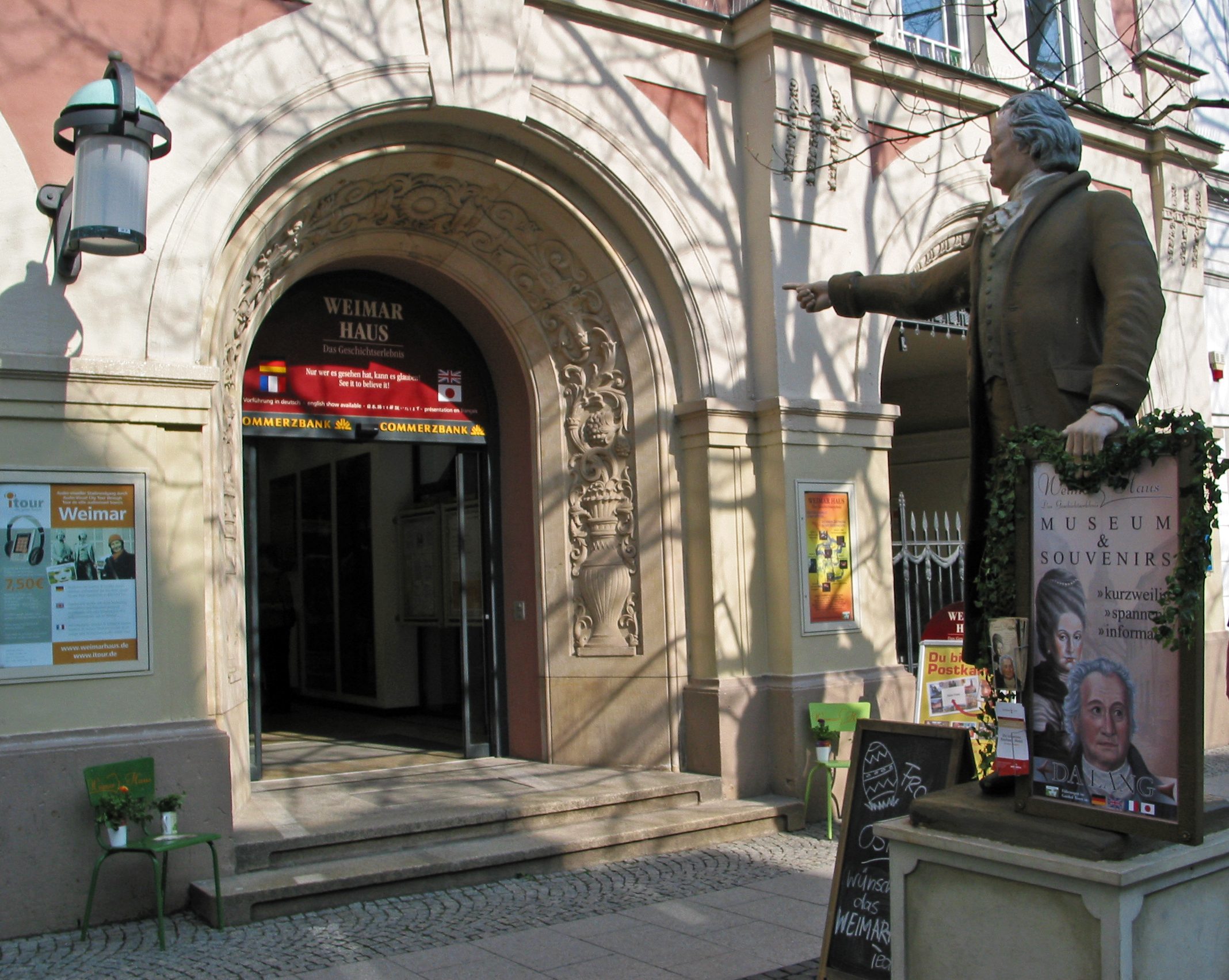 Das Weimarhaus mit dem Haupteingang zur Schillerstraße und dem wegweisenden Goethe.